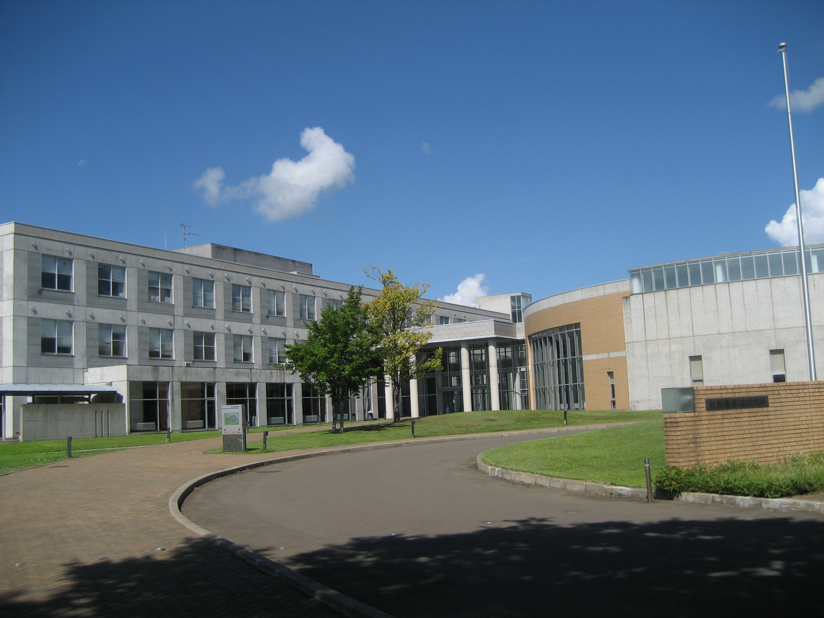 秋田看護福祉大学校舎